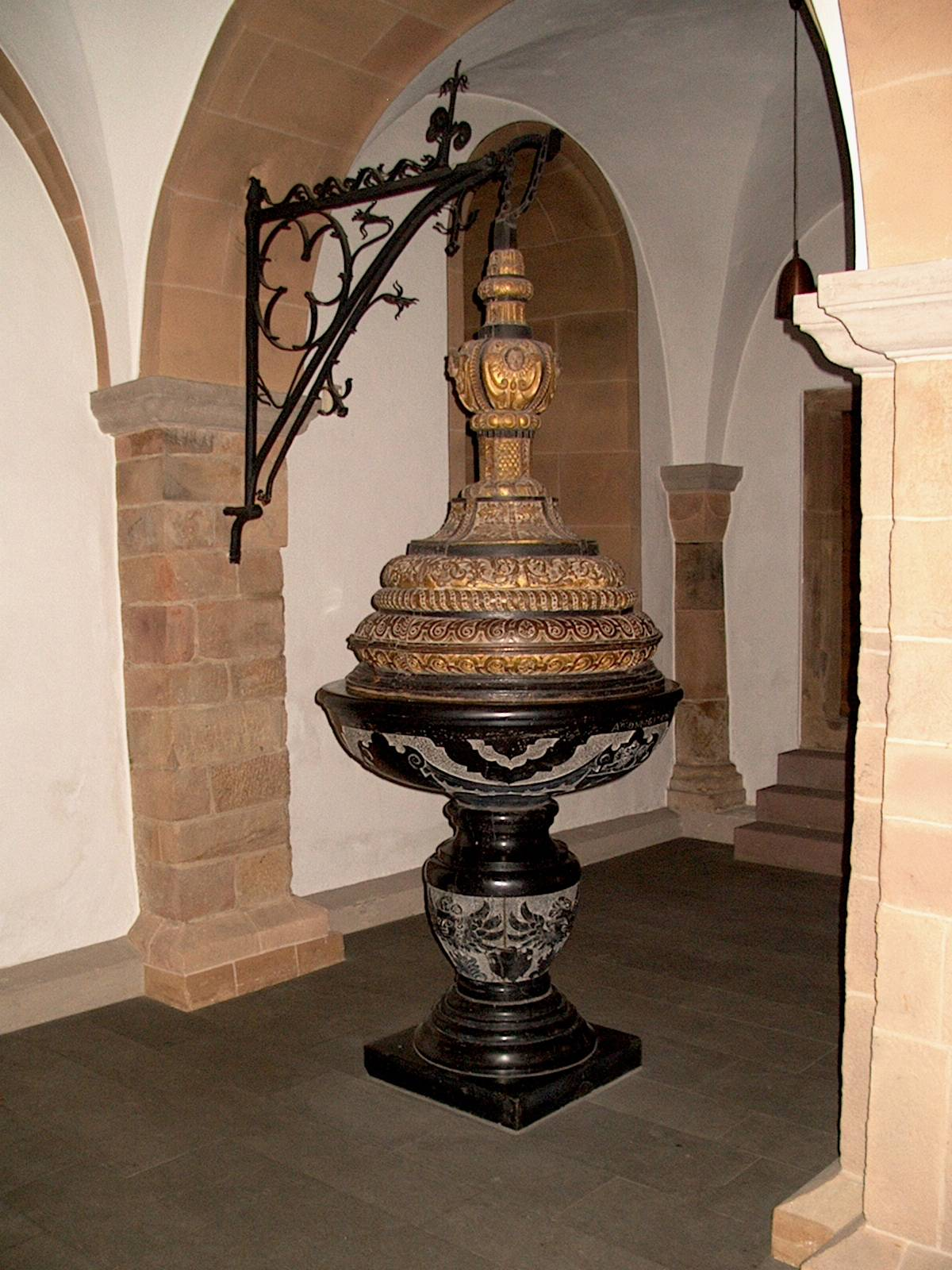 Taufstein Marmor/Holz (1619), Stiftskirche Bad Münstereifel